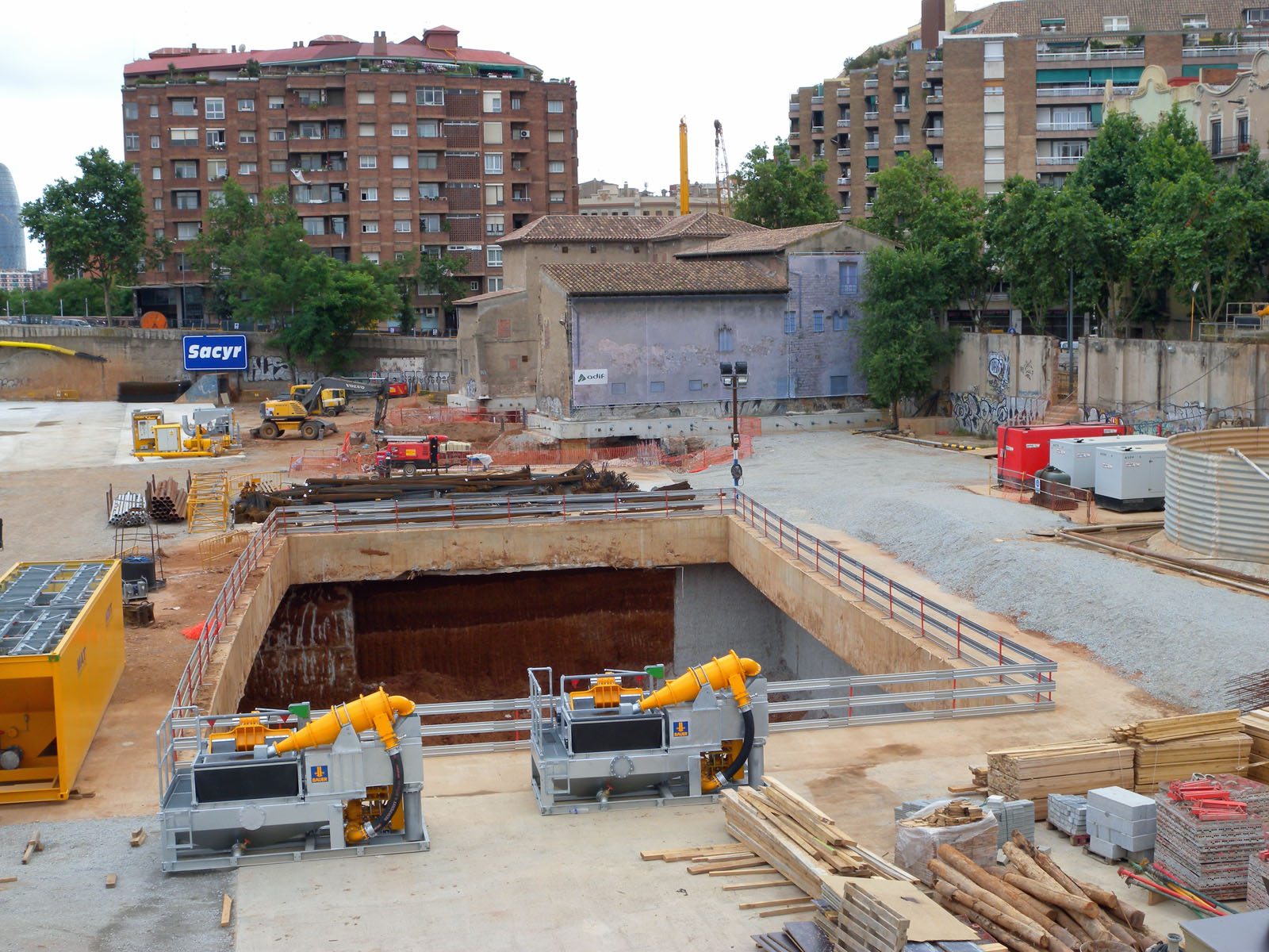 2009-06-07 Torre del Fang